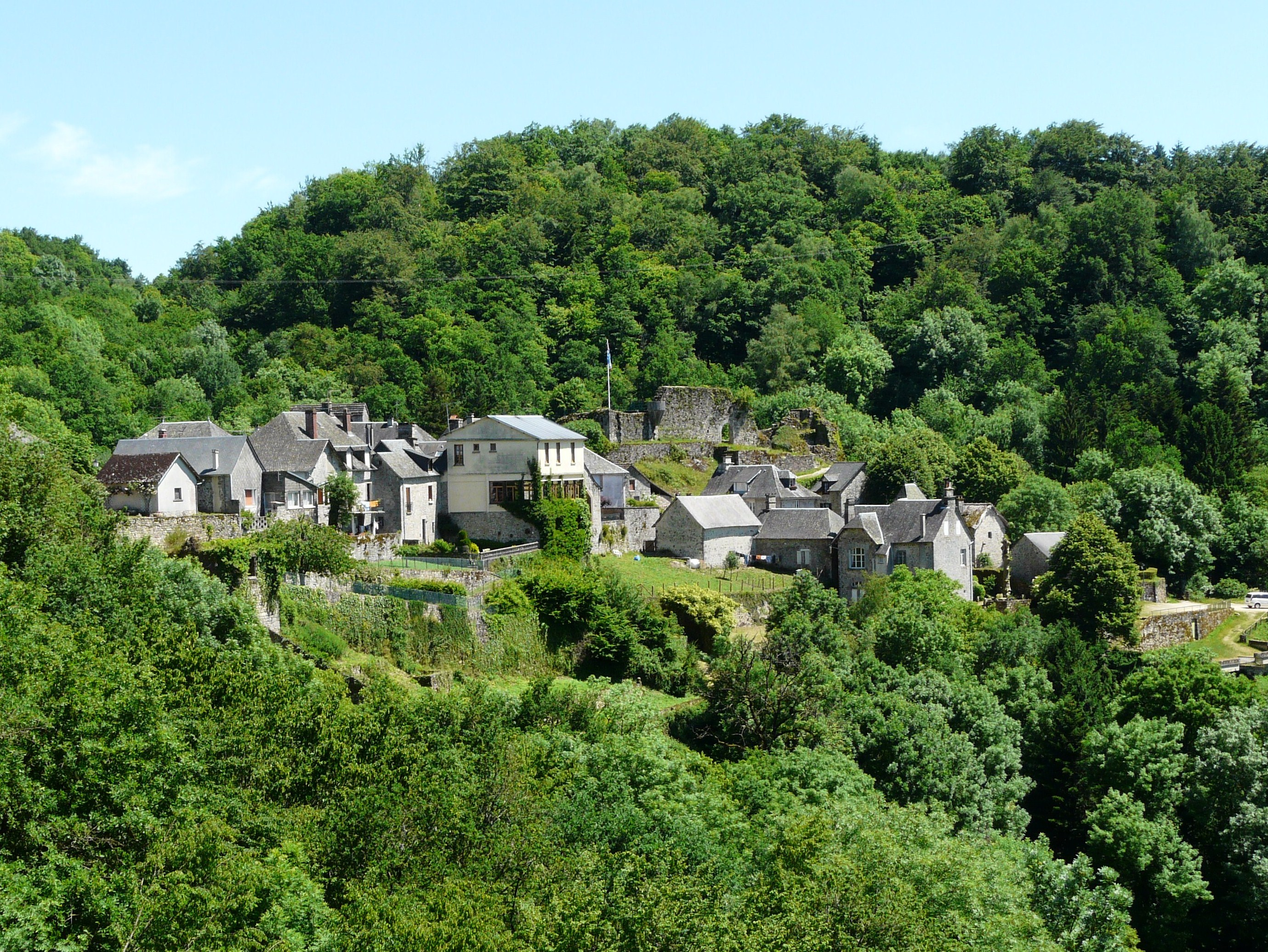 Le bourg de Gimel, Gimel-les-Cascades, Corrèze, France